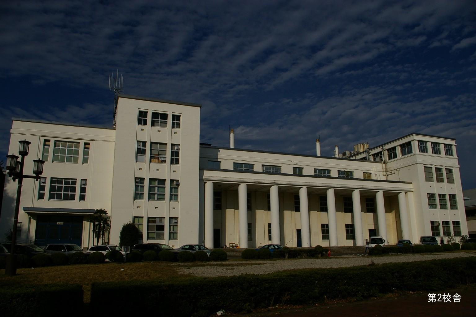 2009.5日本国内で塾生 (talk)が撮影。